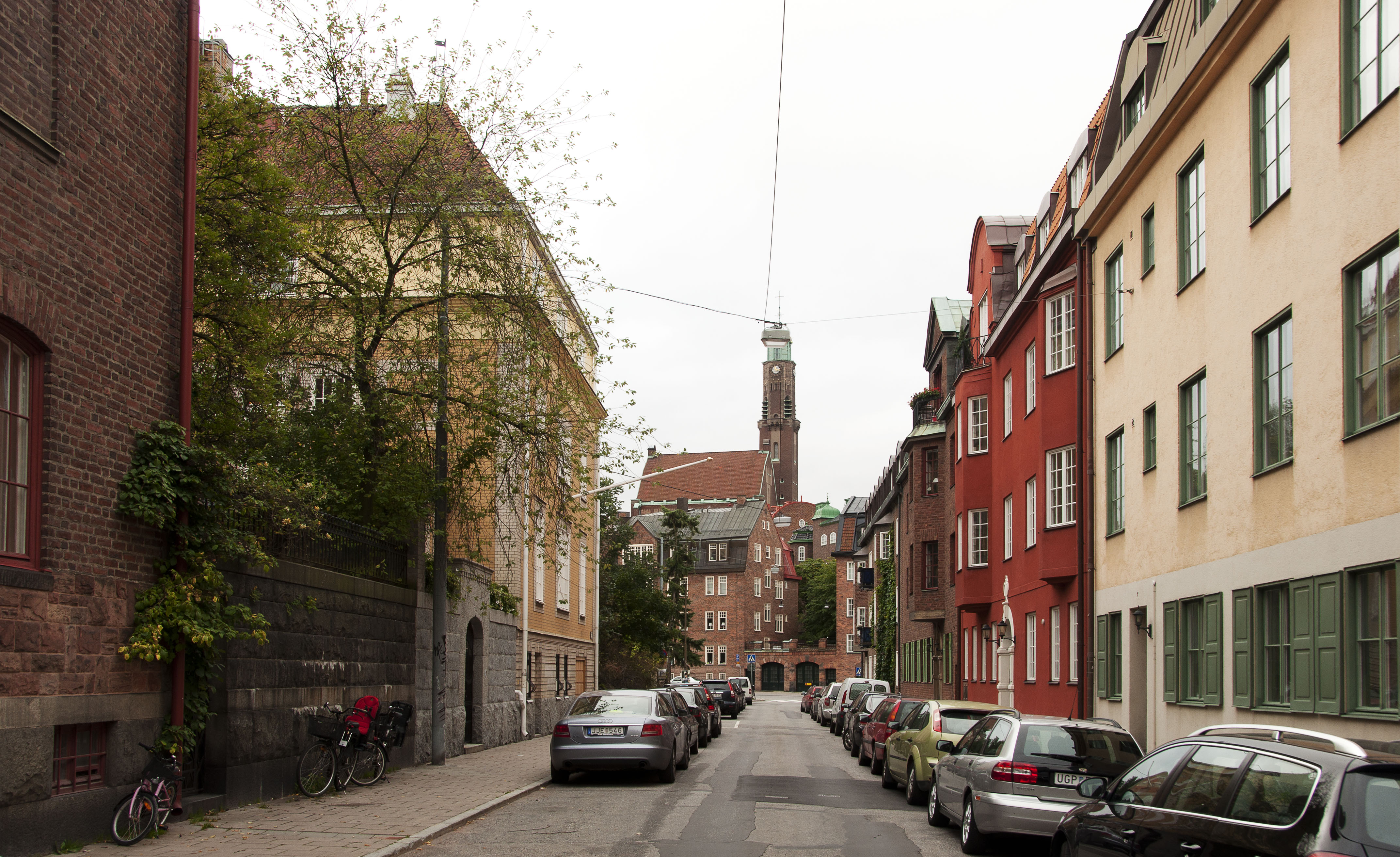 Verdandigatan